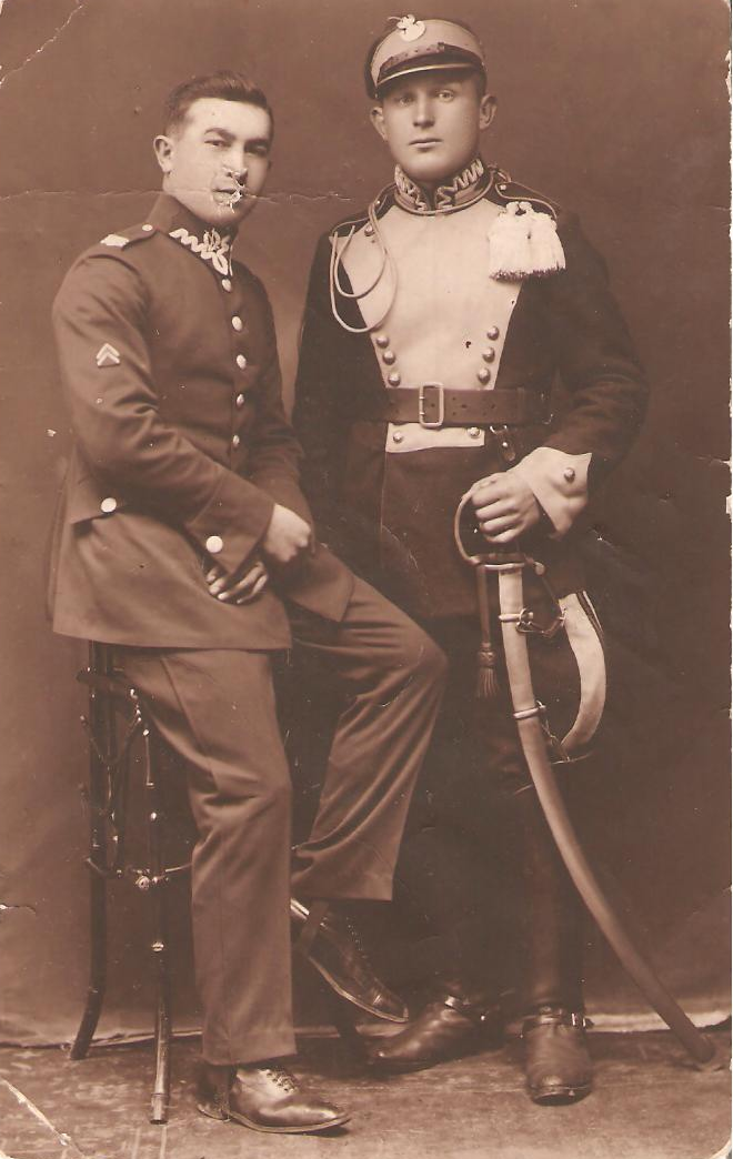 Zdjęcie z albumu rodzinnego.